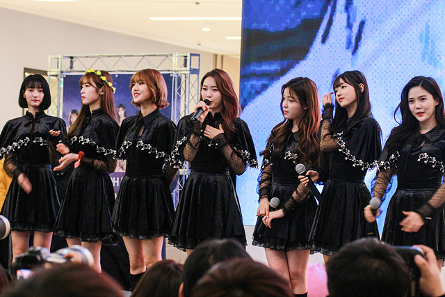 1월 21일 오마이걸 팬사인회